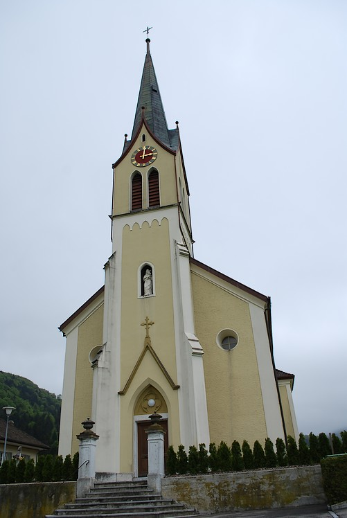 Vue extérieure de l'église de Ramiswil (1869)